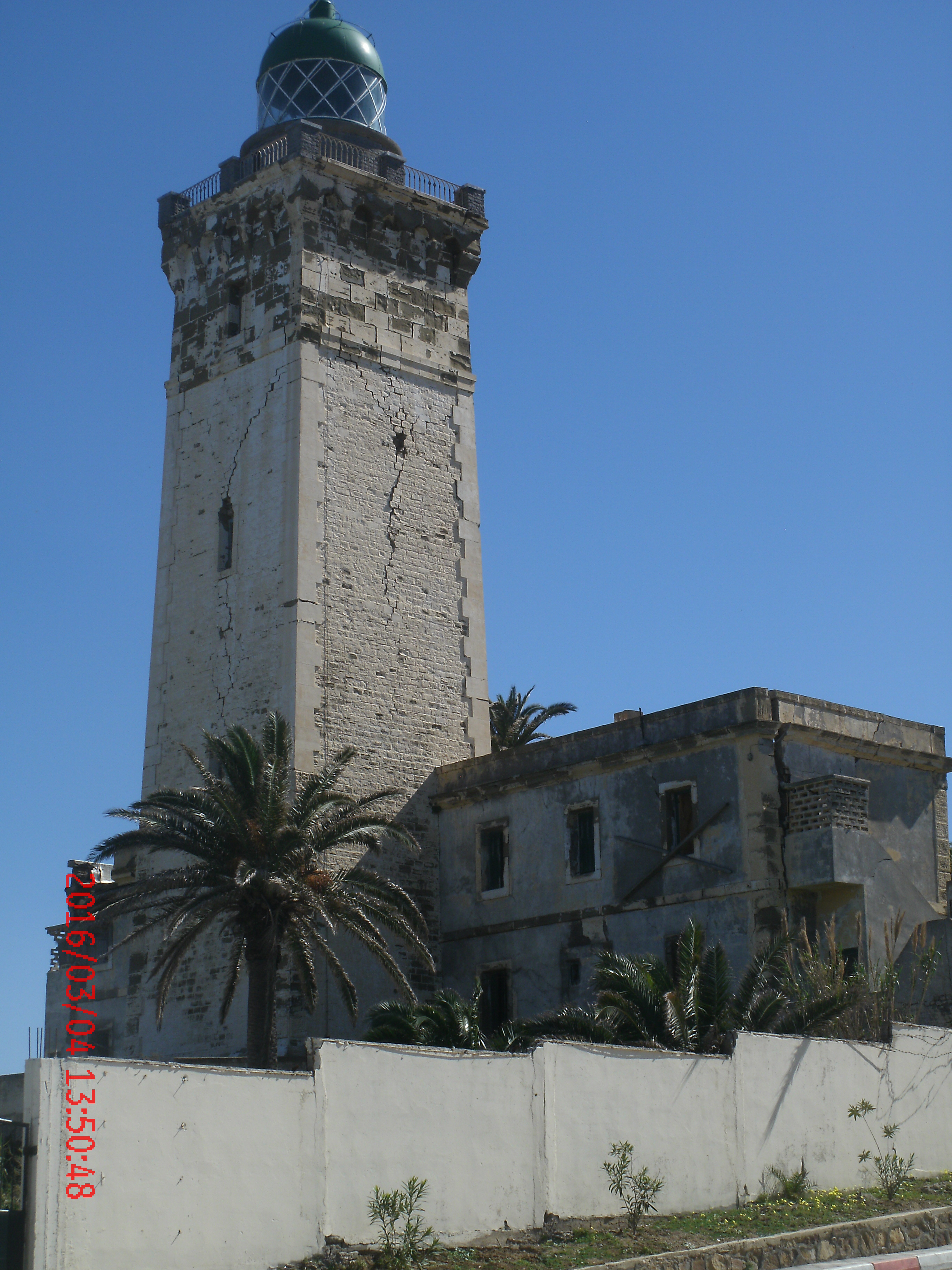 L'ancien phare à Cap Bengut à Dellys